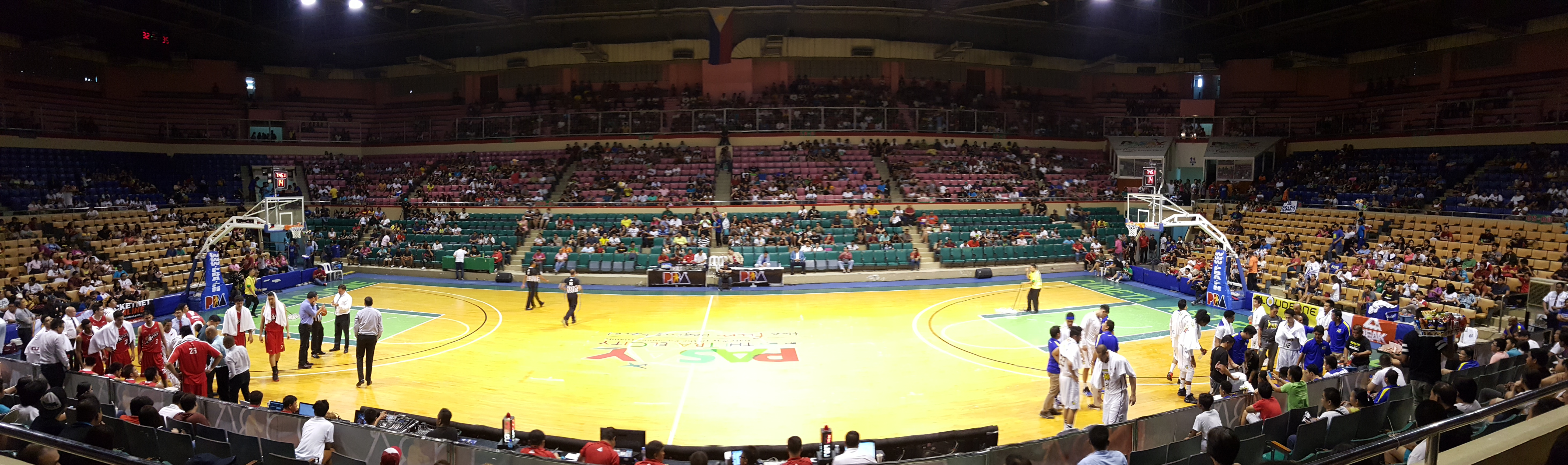 Cuneta Astrodome panorama - PBA - 2016-0417